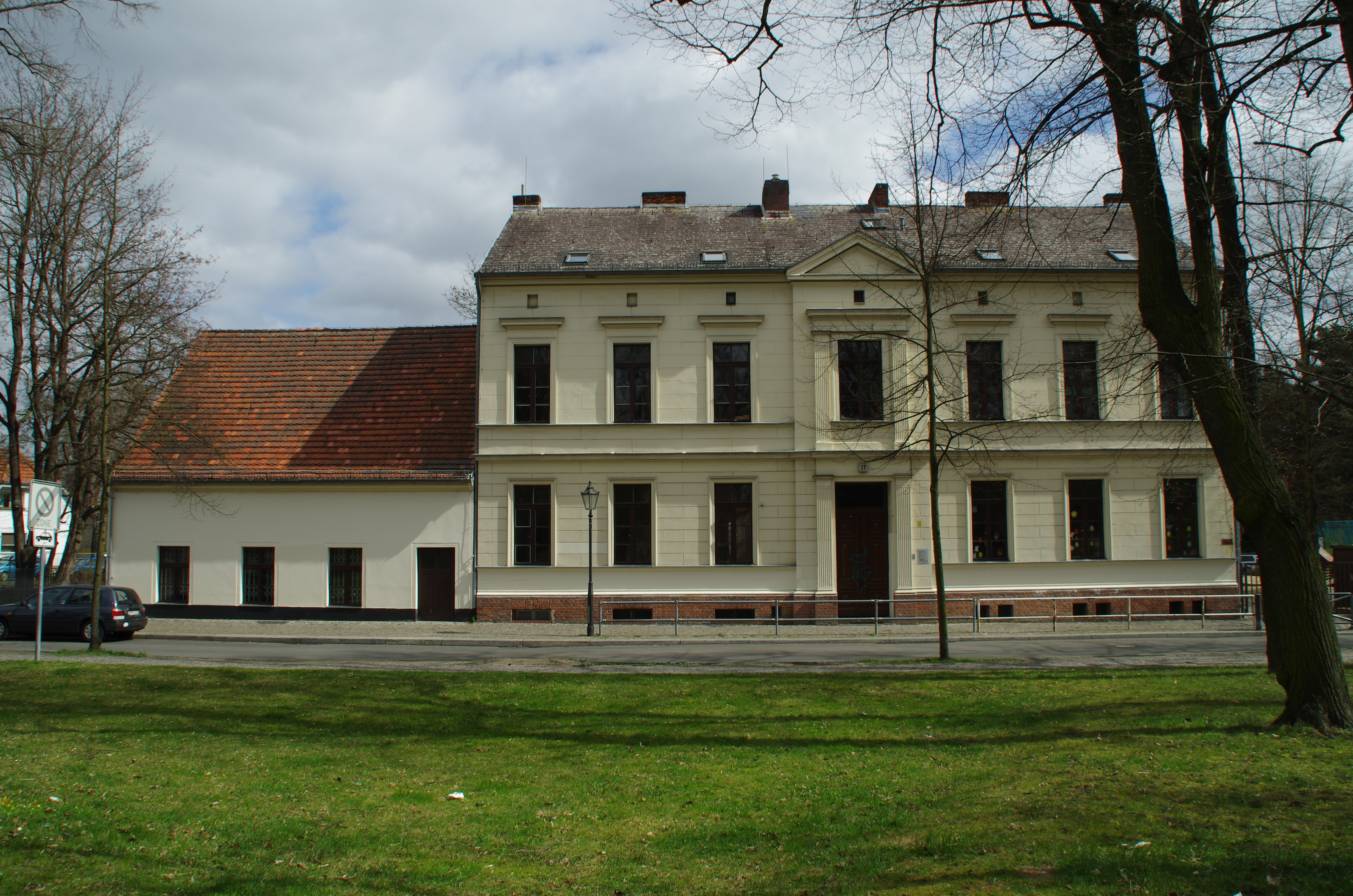 Berlin, Bezirk Neukölln, Ortsteil Britz. Das Haus Backbergstraße 37 steht unter Denkmalschutz.